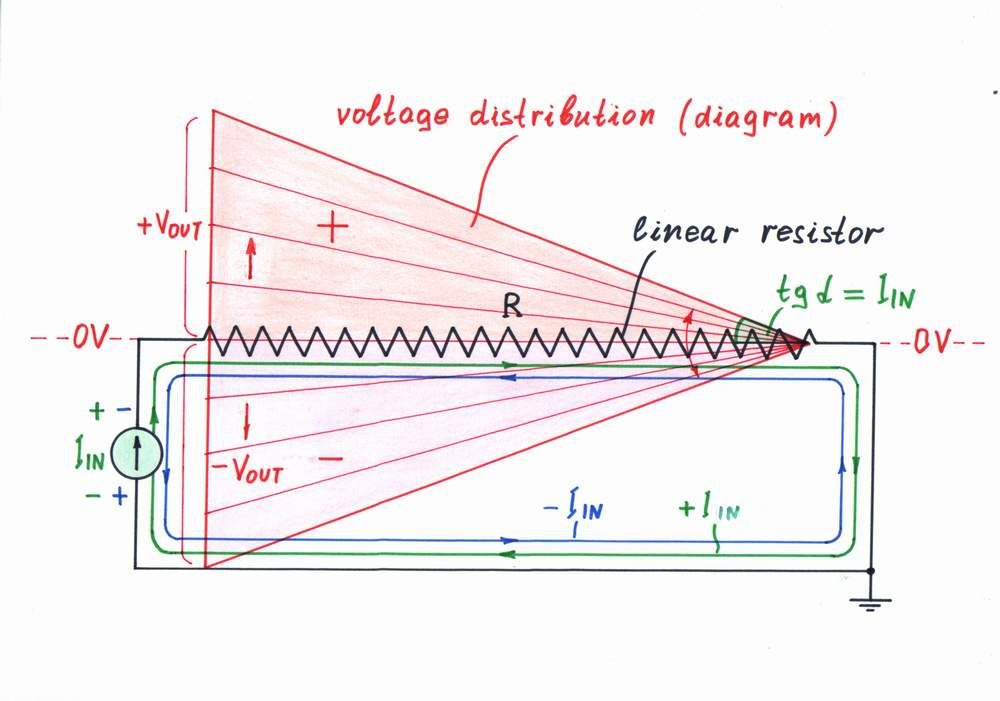 Voltage diagram of voltage-to-current converter